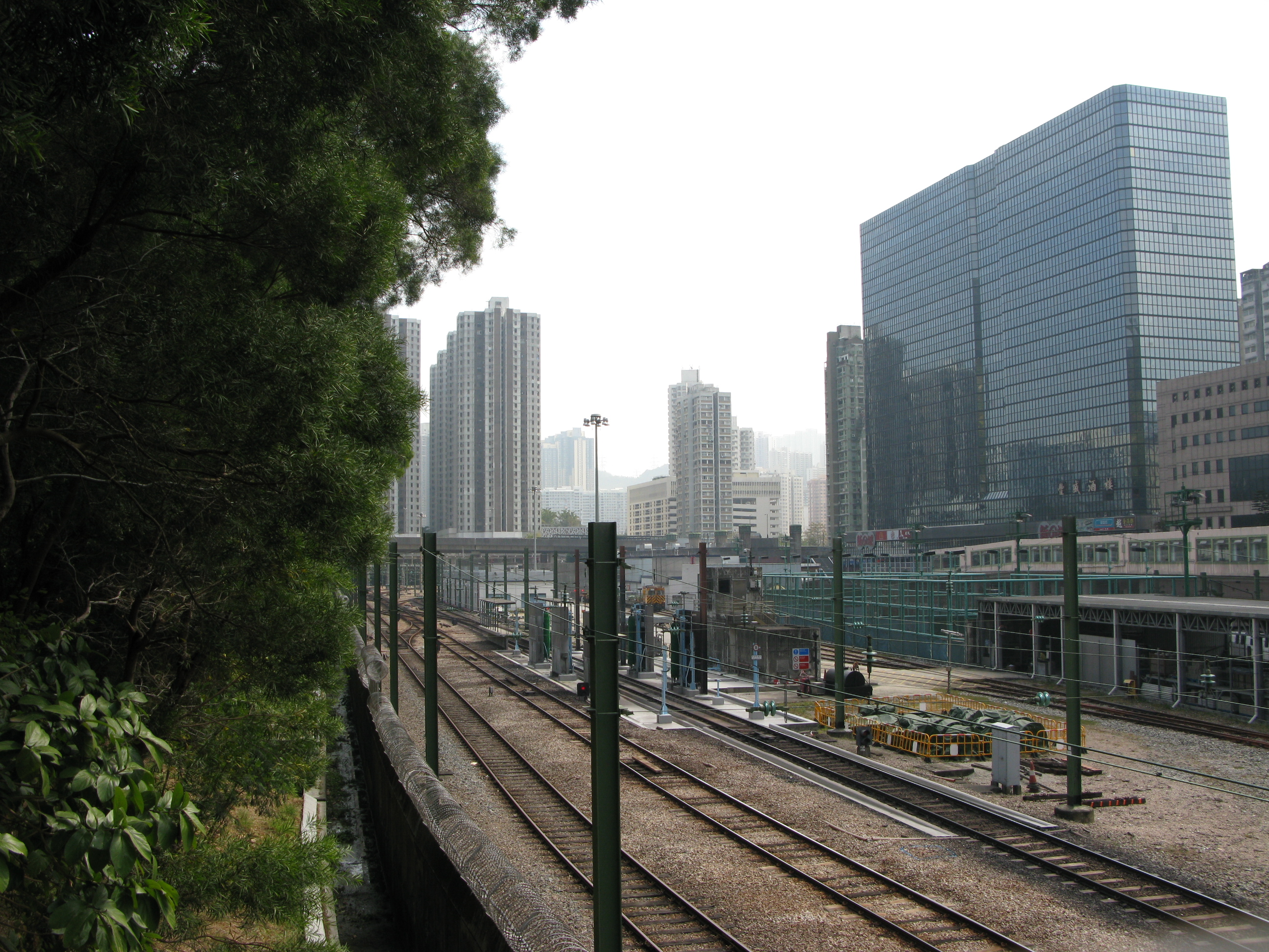 中文（香港）: 香港荃灣港鐵車廠